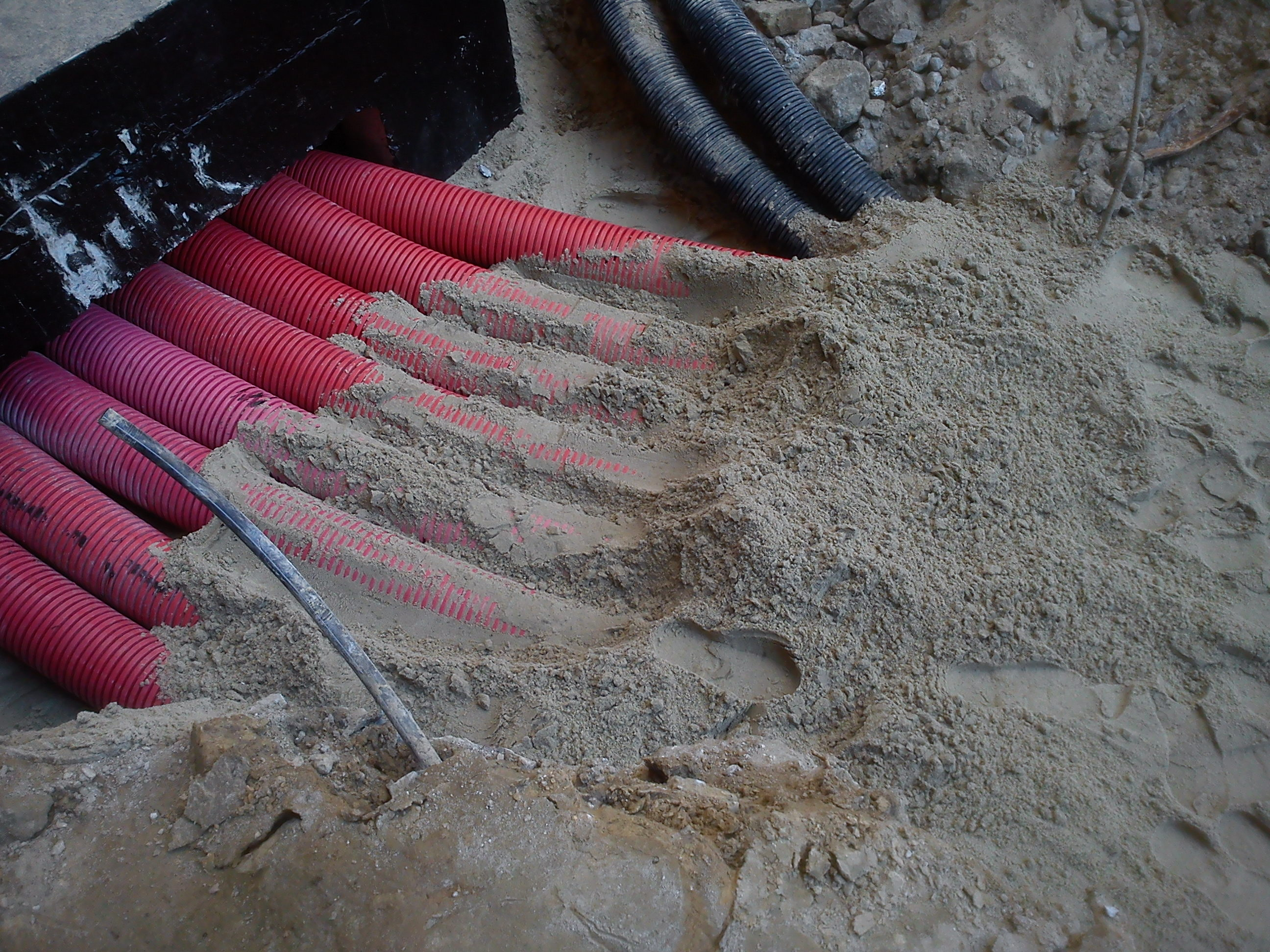 Кабельна каналізація. Полімерні труби входять в камеру 10 кВ.